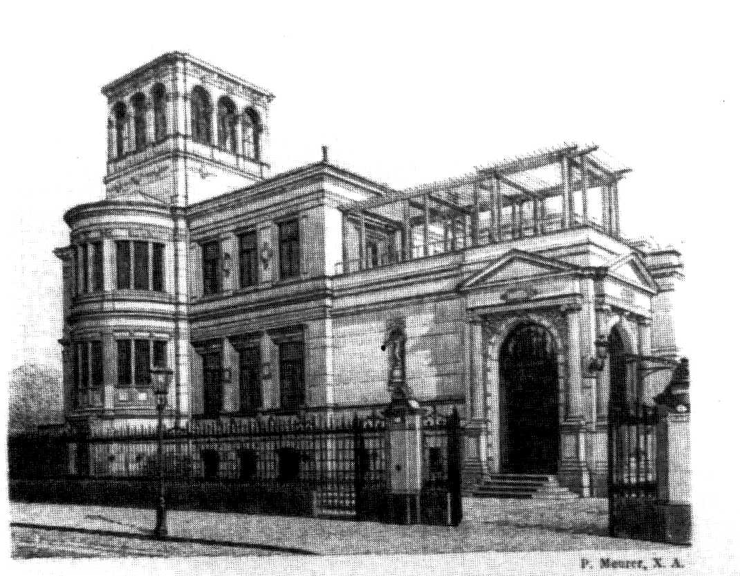 Dresden, Villa Beuststraße 1